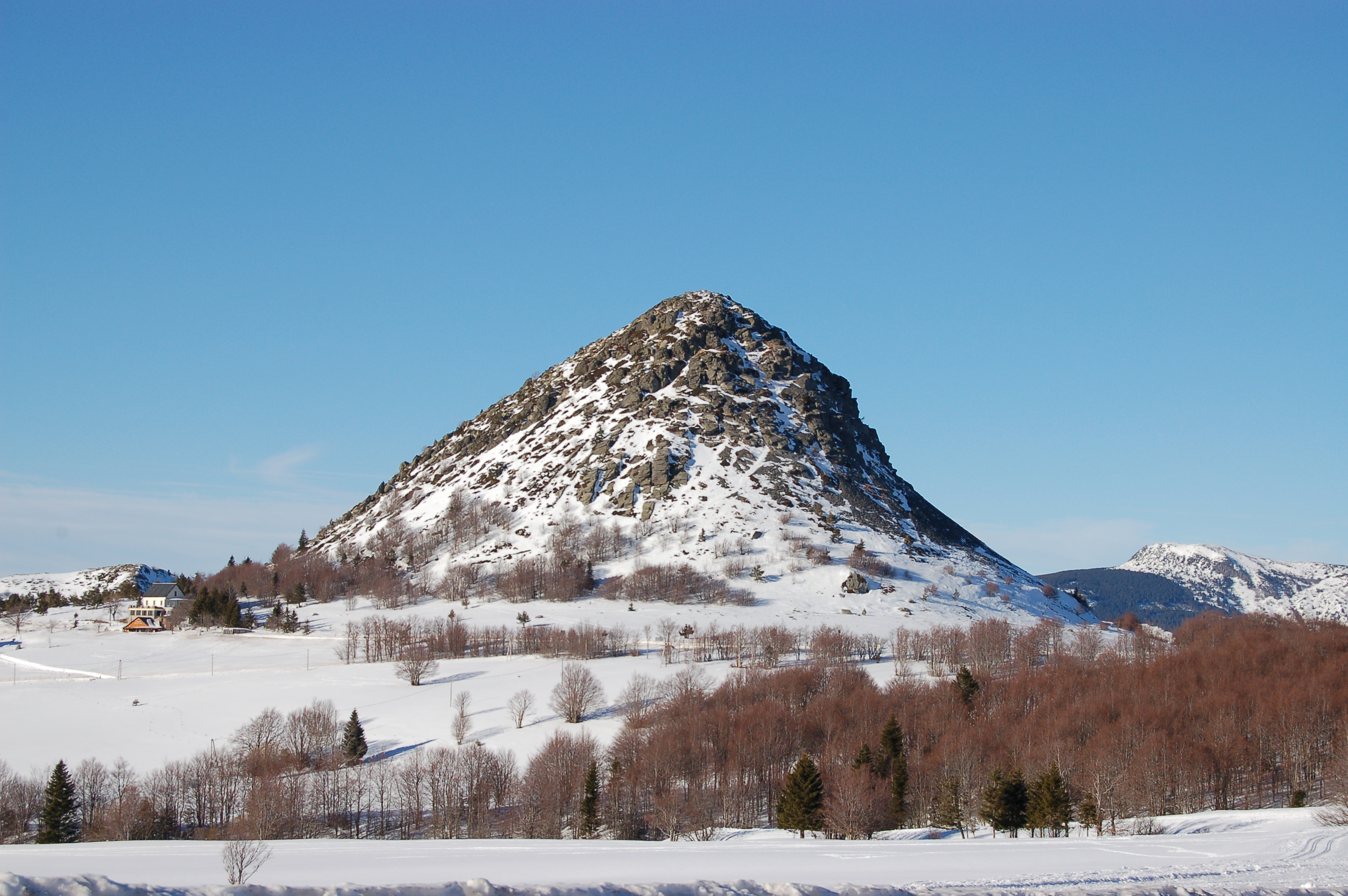 Gerbier de Joncs sous la neige